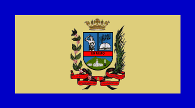 Bandera del municipio Chacao, Caracas, estado Miranda, Venezuela